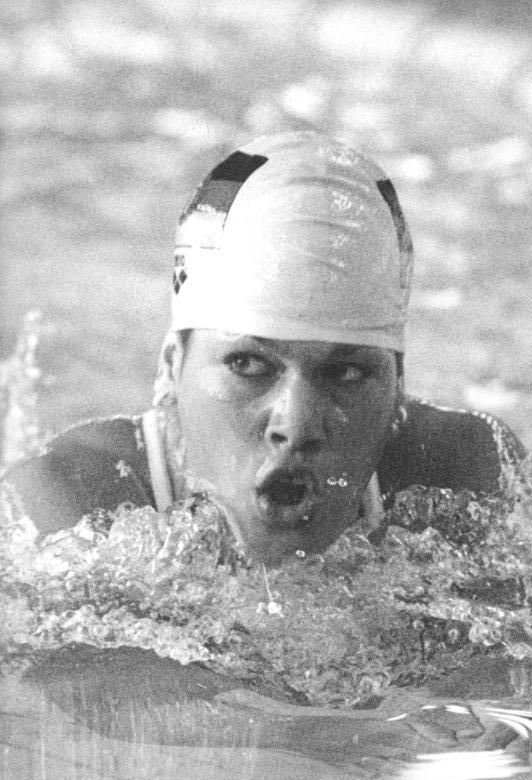 Silke Hörner ADN-ZB Kluge 8.6.85 Leipzig: 36. DDR-Schwimm-Meisterschaften- Einen neuen Weltrekord über 200 m Brust erzielte mit 2:28,33 min die 19jährige Leipzigerin Silke Hörner.